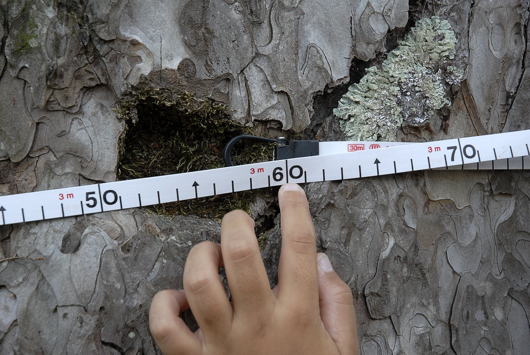 Mesurant la corda de la Pinassa de la Closella.